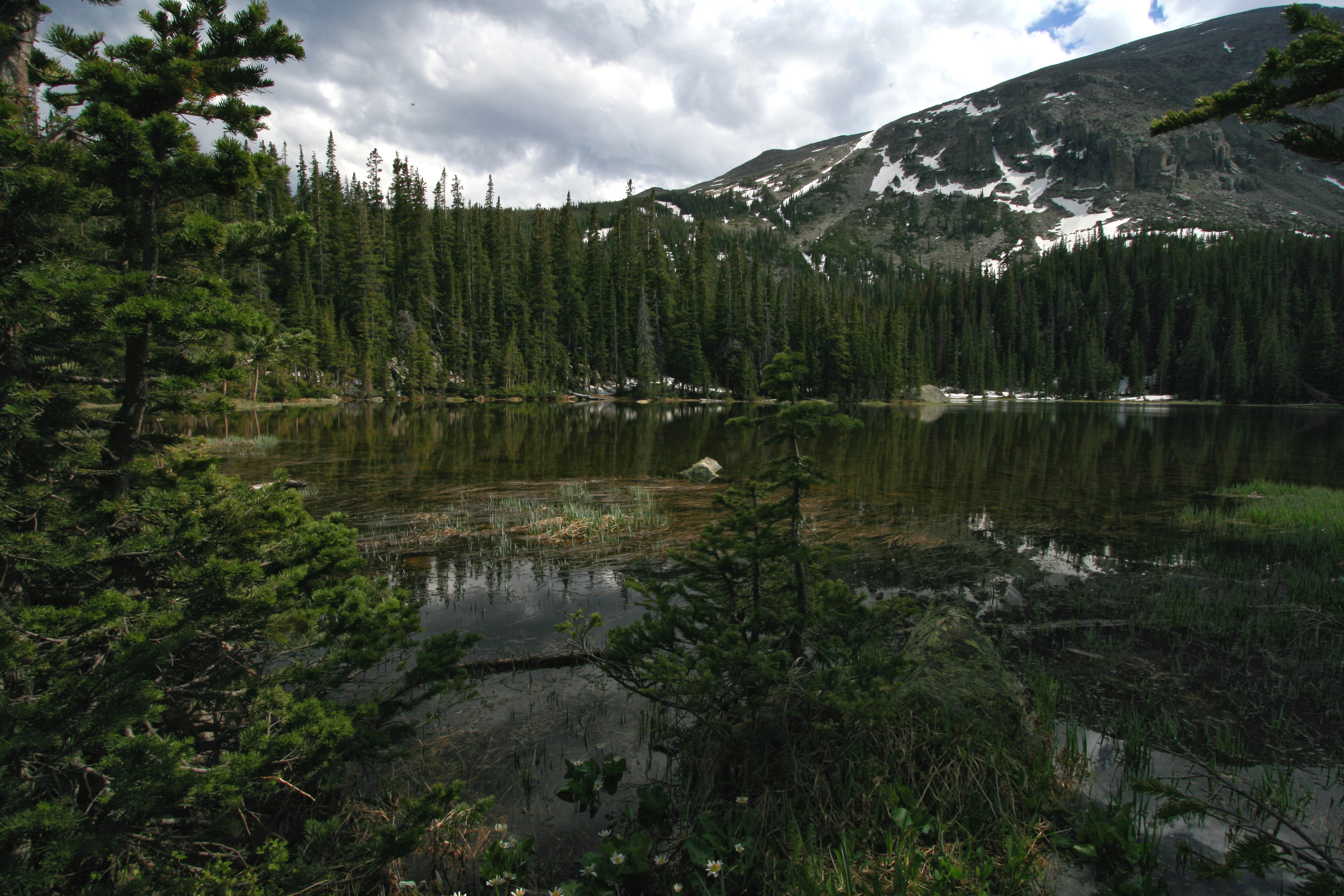 Ouzel Lake.